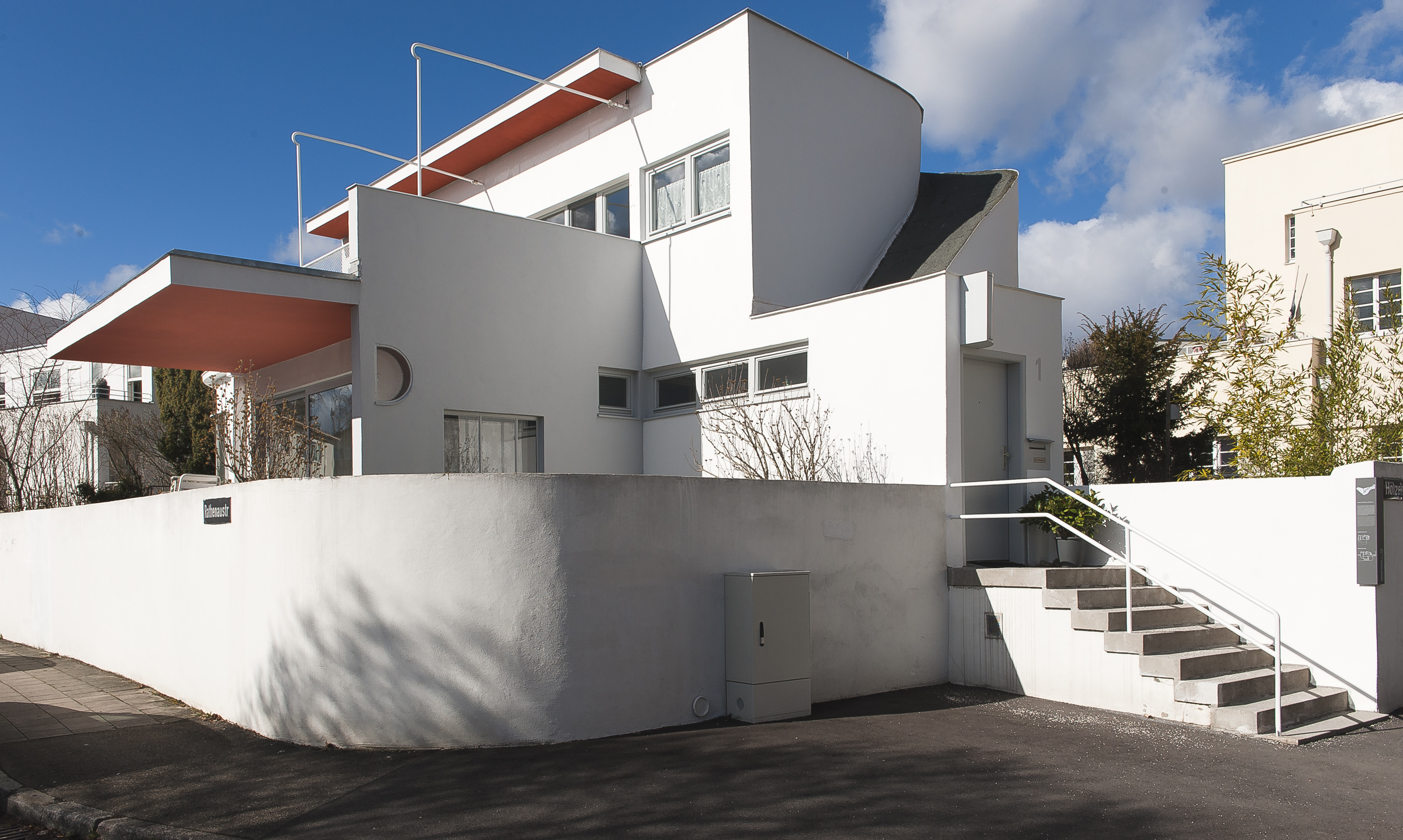 Weißenhofsiedlung, Stuttgart, Haus von Hans Scharoun